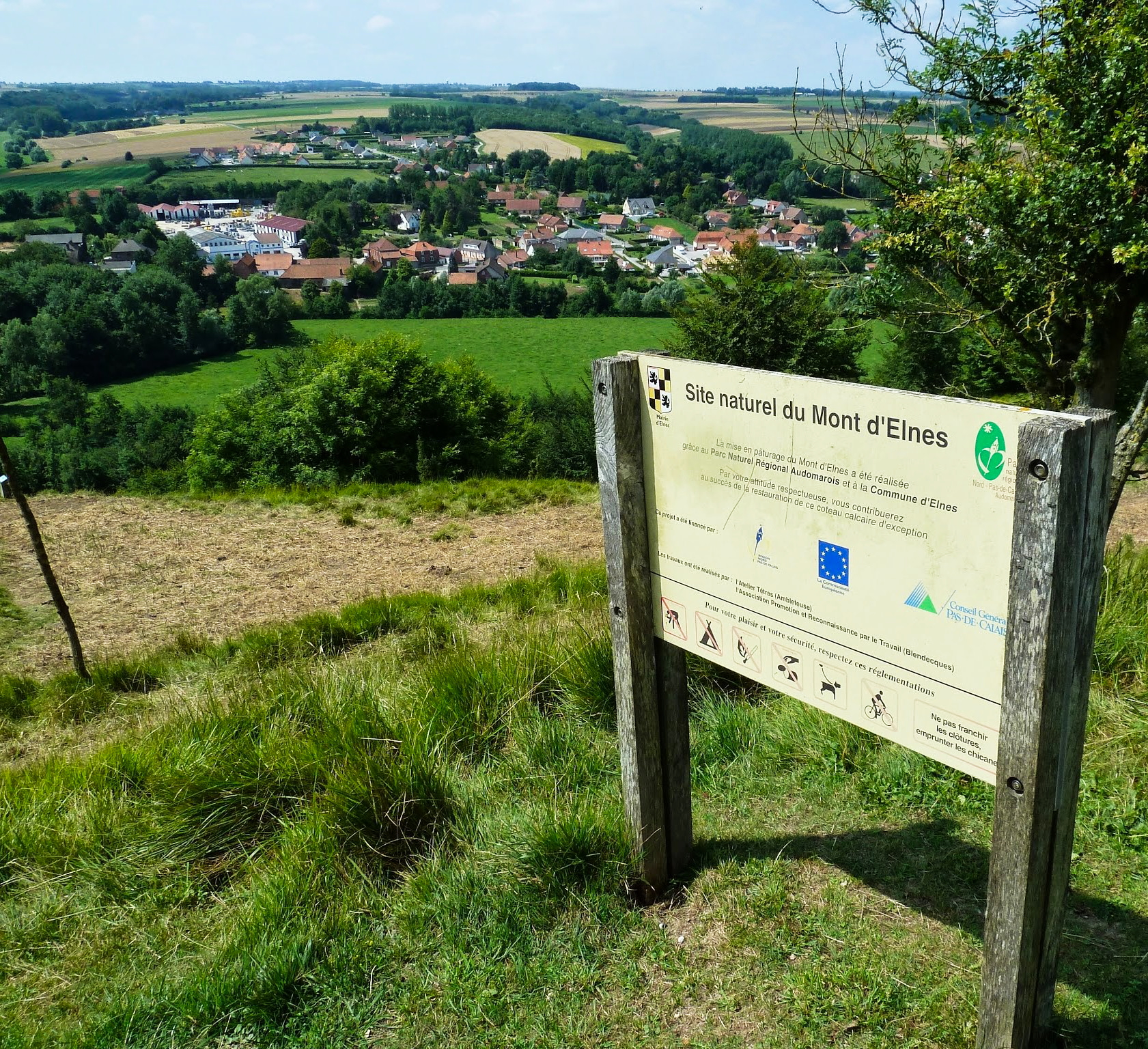 Elnes vu des coteaux de Wavrans-sur-l'Aa Réserve naturelle nationale des grottes et des pelouses d'Acquin-Westbécourt et des coteaux de Wavrans-sur-l'Aa, dans l' Audomarois.- Pas-de-Calais